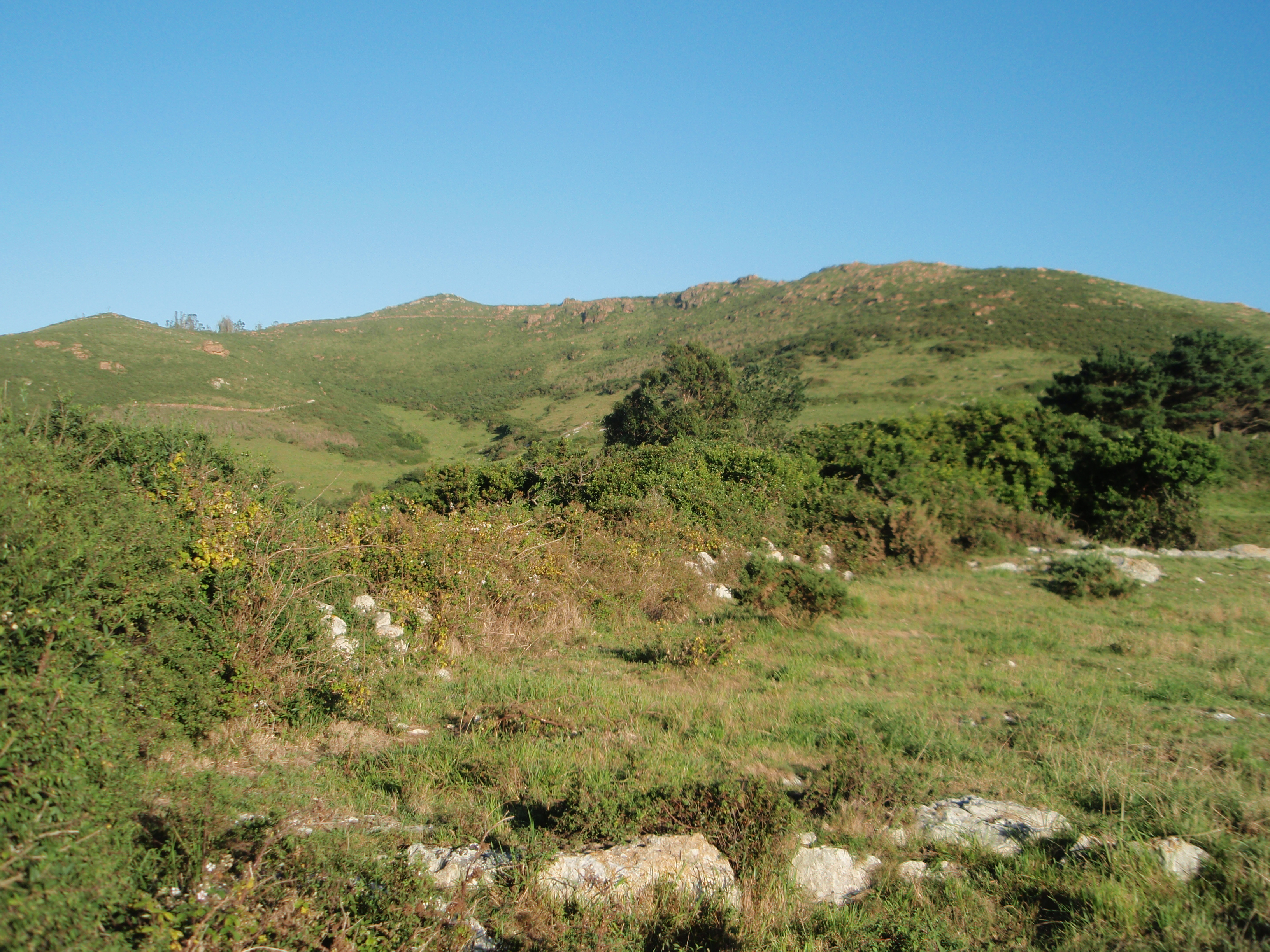 Monte Huervo, situado en el municipio de Santillana del Mar (España).